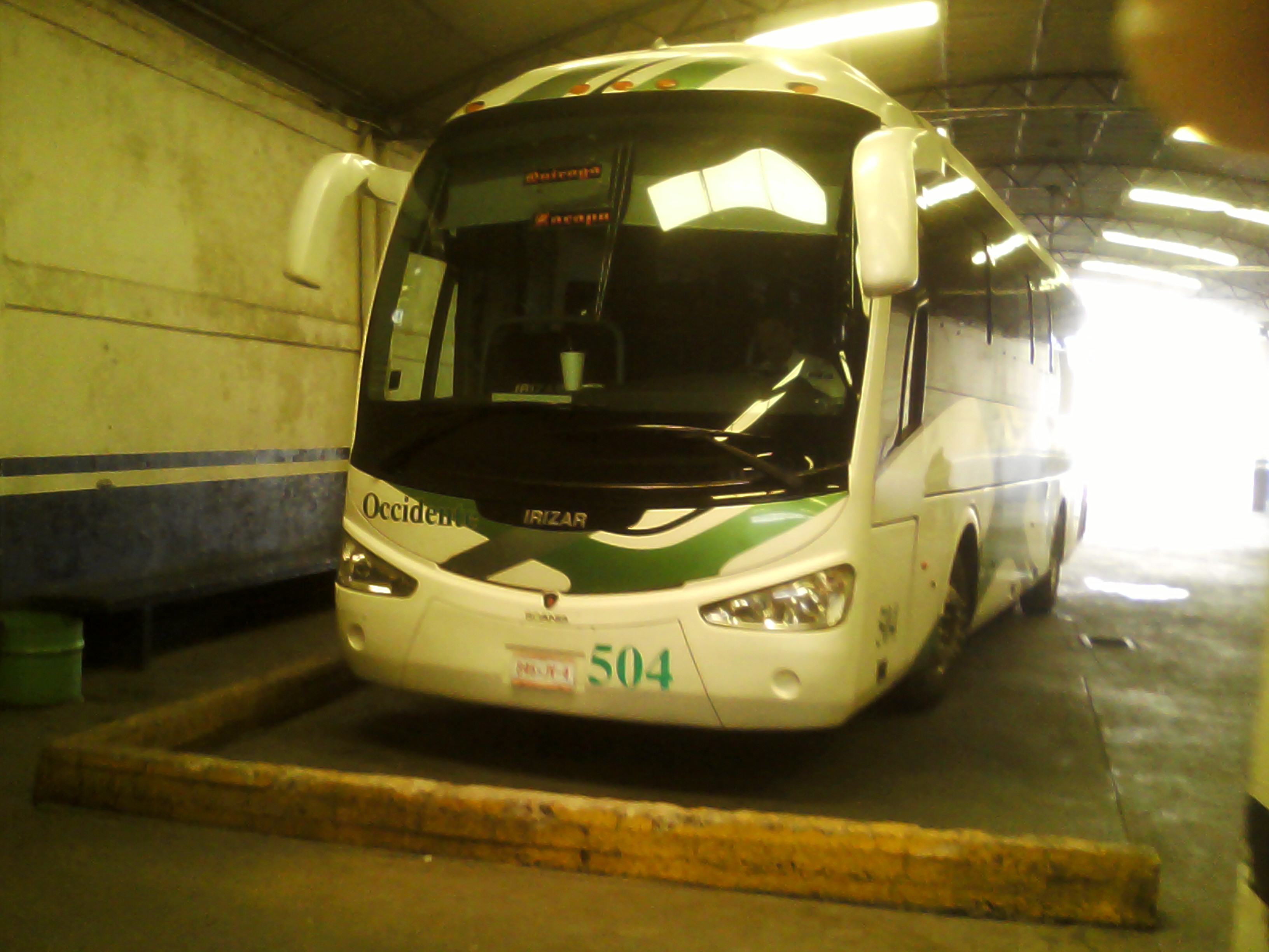 Autobus de occidente en la zona de andenes secundarios de la Terminal de Autobuses Zacapu